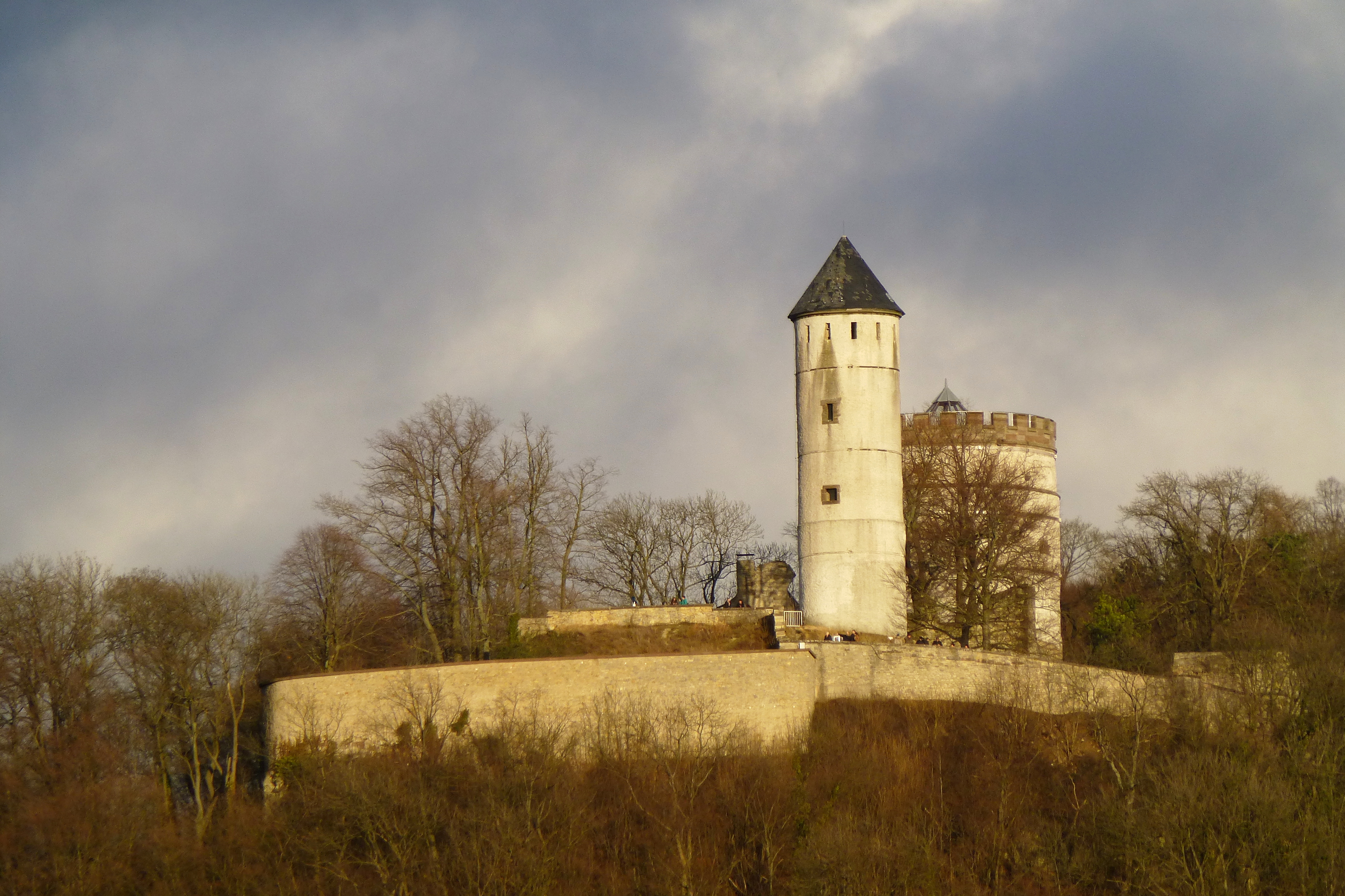 Blick von Südwesten auf die Plesse, Südniedersachsen